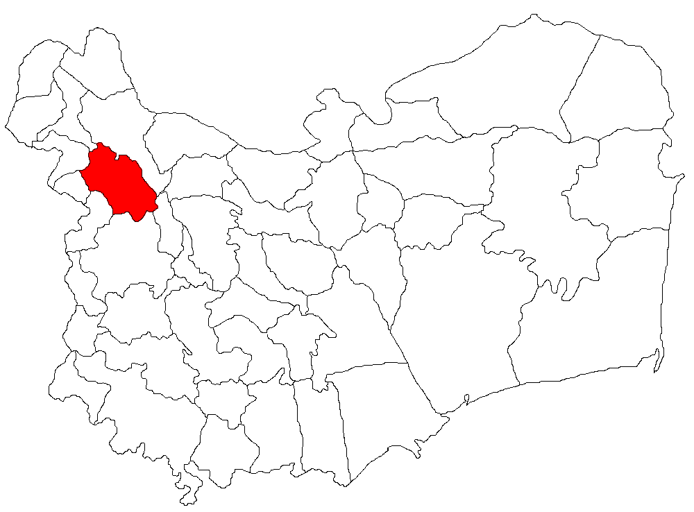 Categorie:Hărţi ale judeţului Tulcea